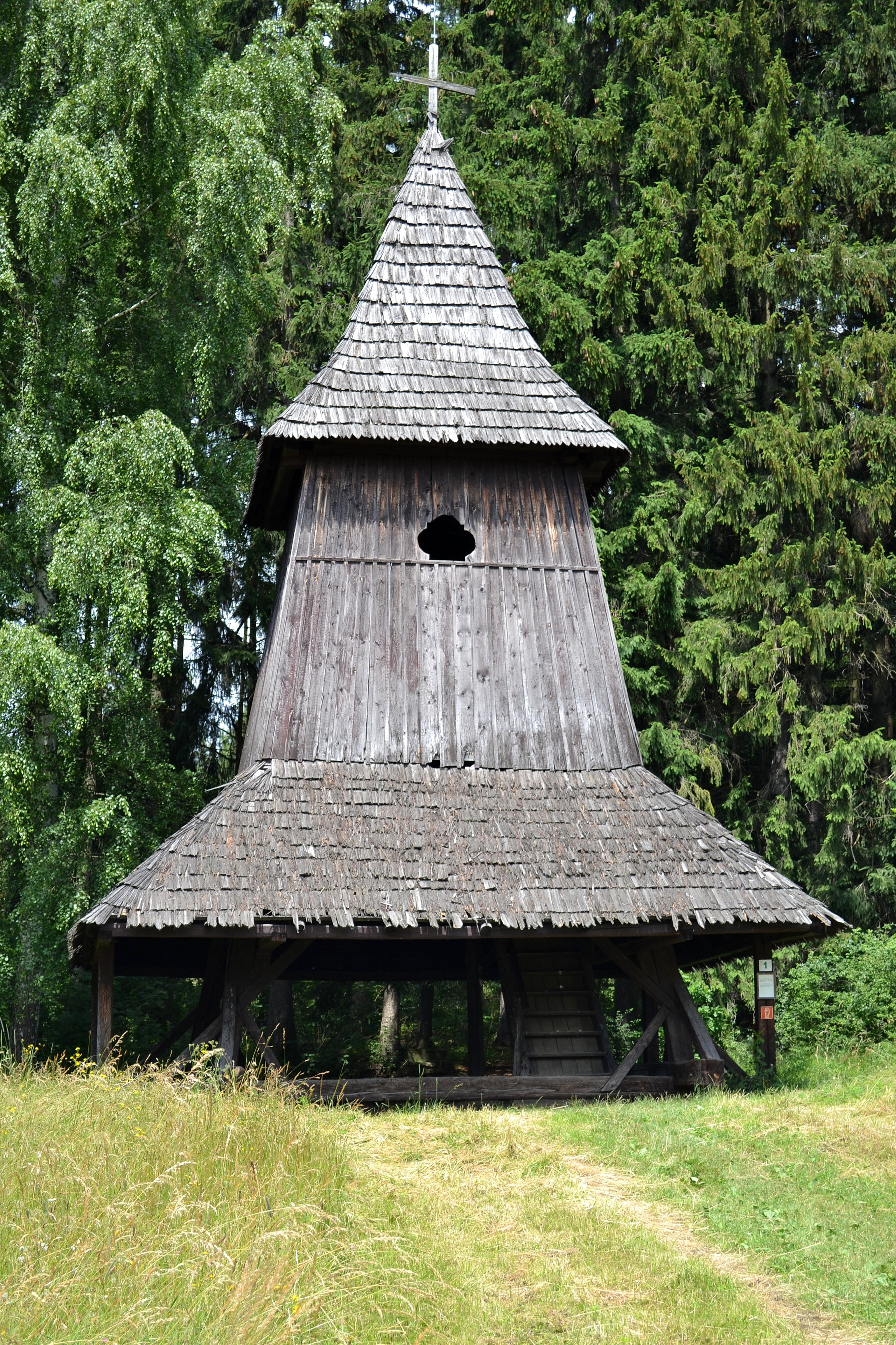 Kópia zvonice z Trsteného (okr. Liptovský Mikuláš) v Múzeu slovenskej dediny v Martine